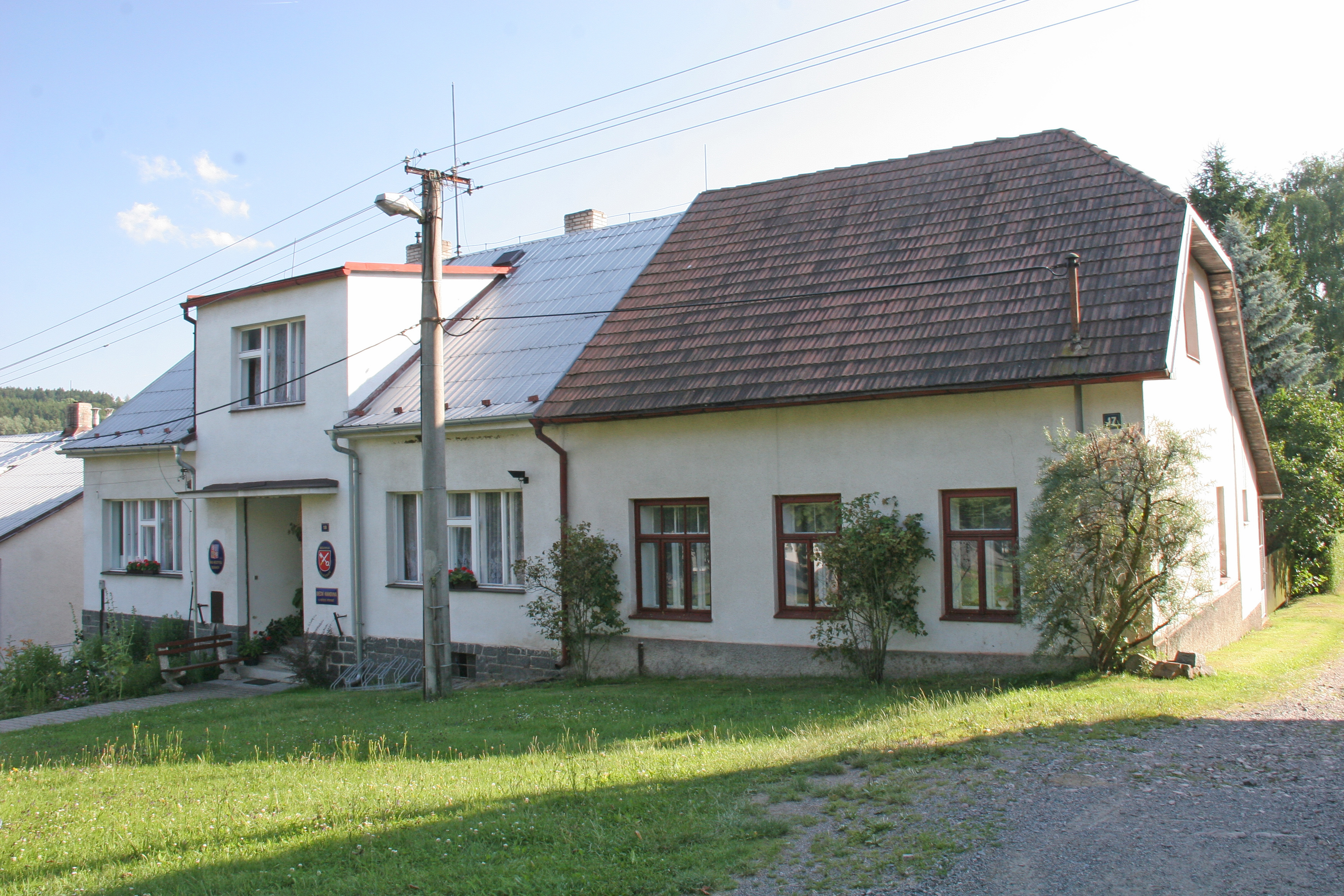 Bojanov obecní úřad